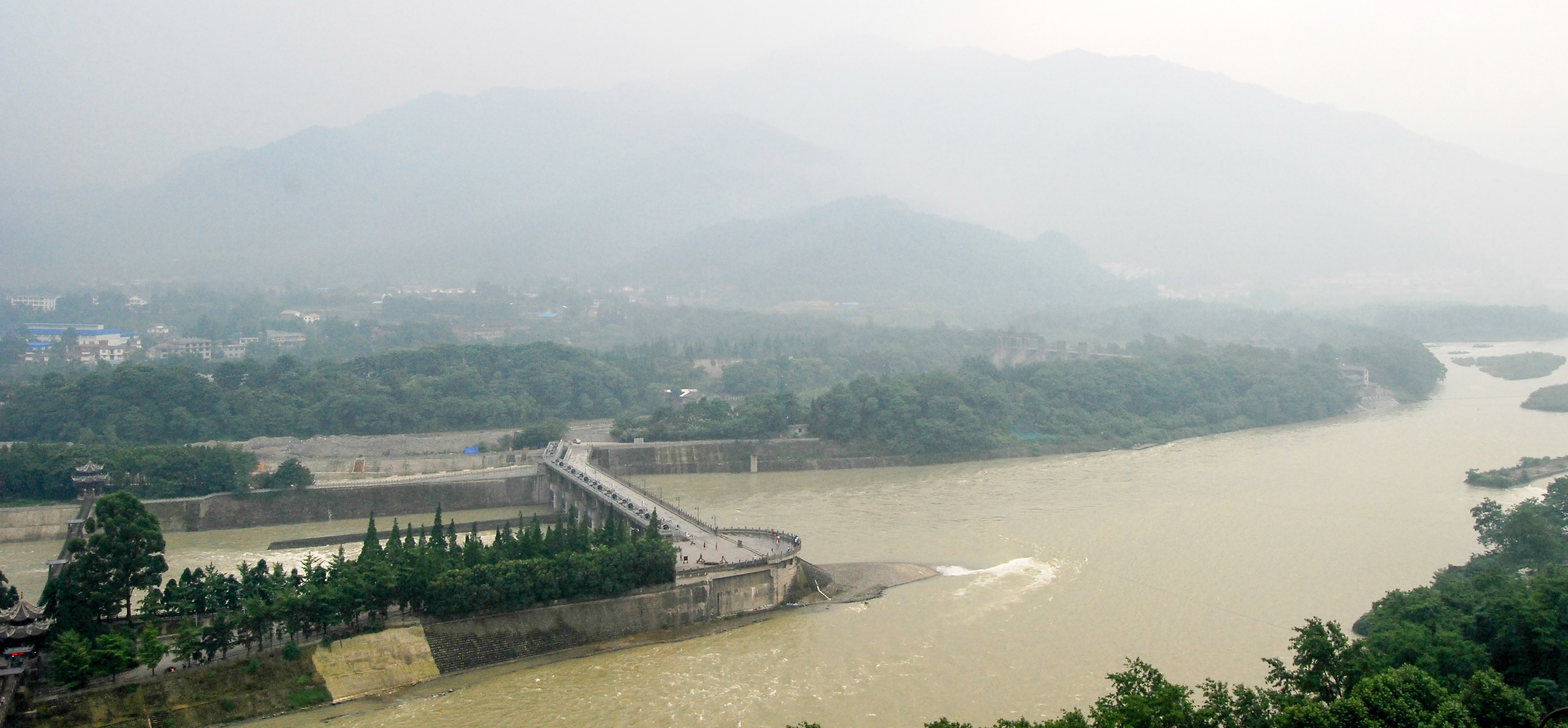 中文（中国大陆）: 四川都江堰